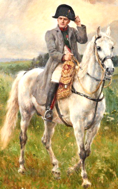 Napoleone a cavallo